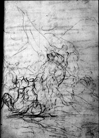 Anibal vencedor contempla Italia desde los Alpes. Dibujo preparatorio en el Cuaderno Italiano